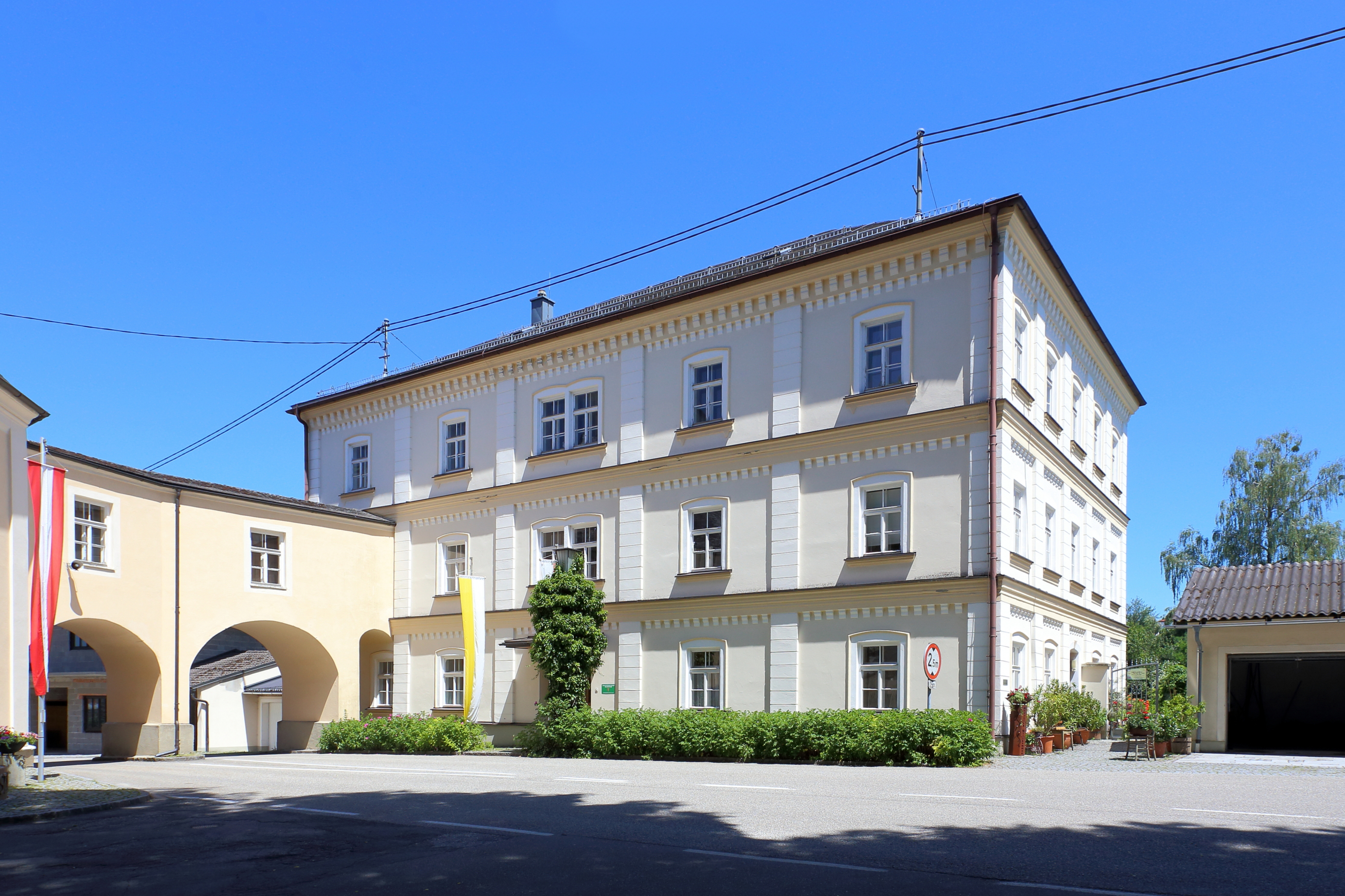 Hauptgebäude der Franziskaner in der oberösterreichischen Gemeinde Maria Schmolln. Ursprünglich ein Priesterhaus, das 1871 erweitert wurde.